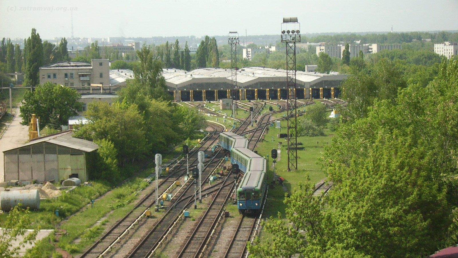 Вид на электродепо «Московское» в Харькове.